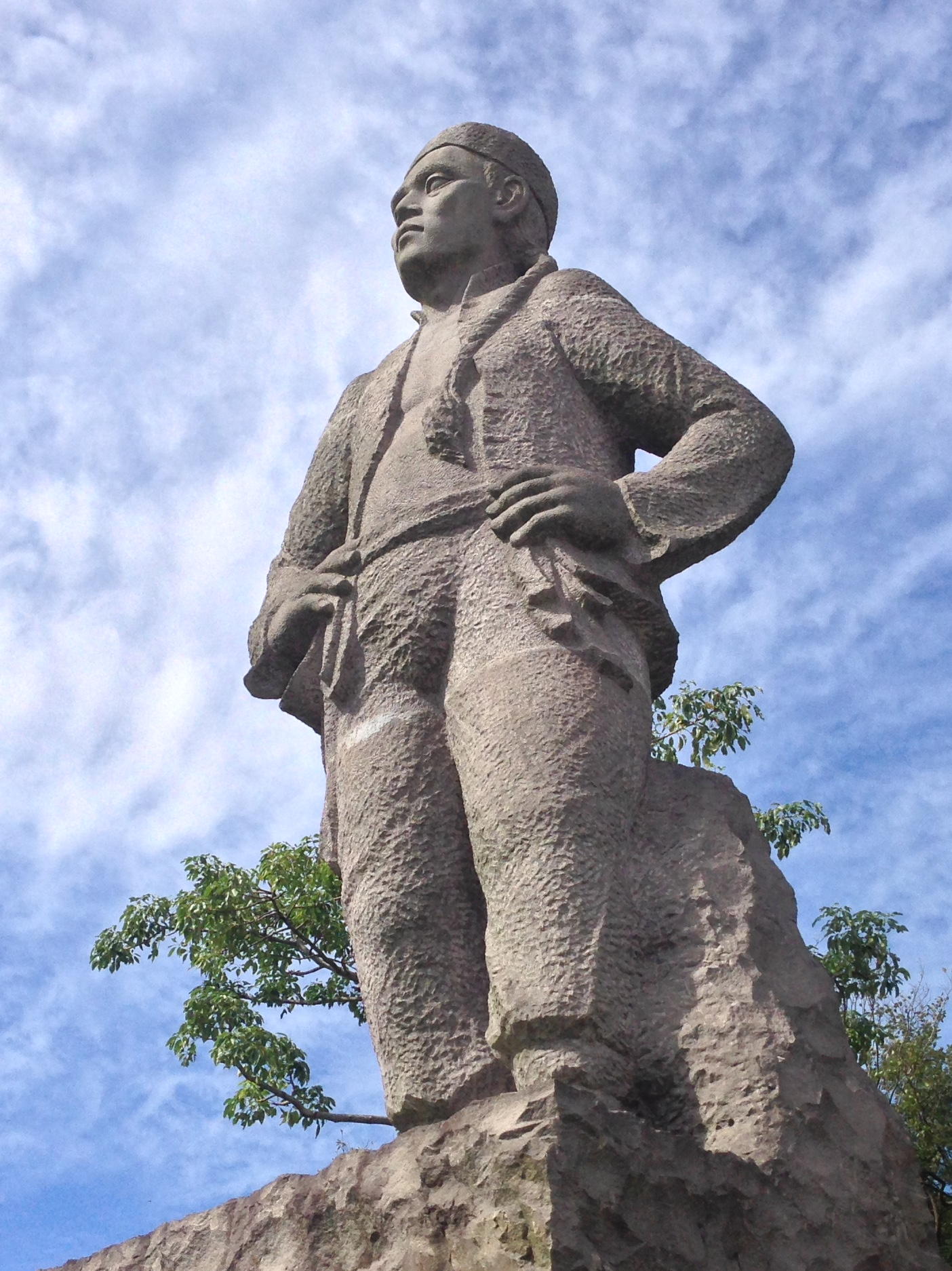 廖添丁石像